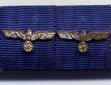 Bandschnalle eines Offiziers im 2. Weltkrieg